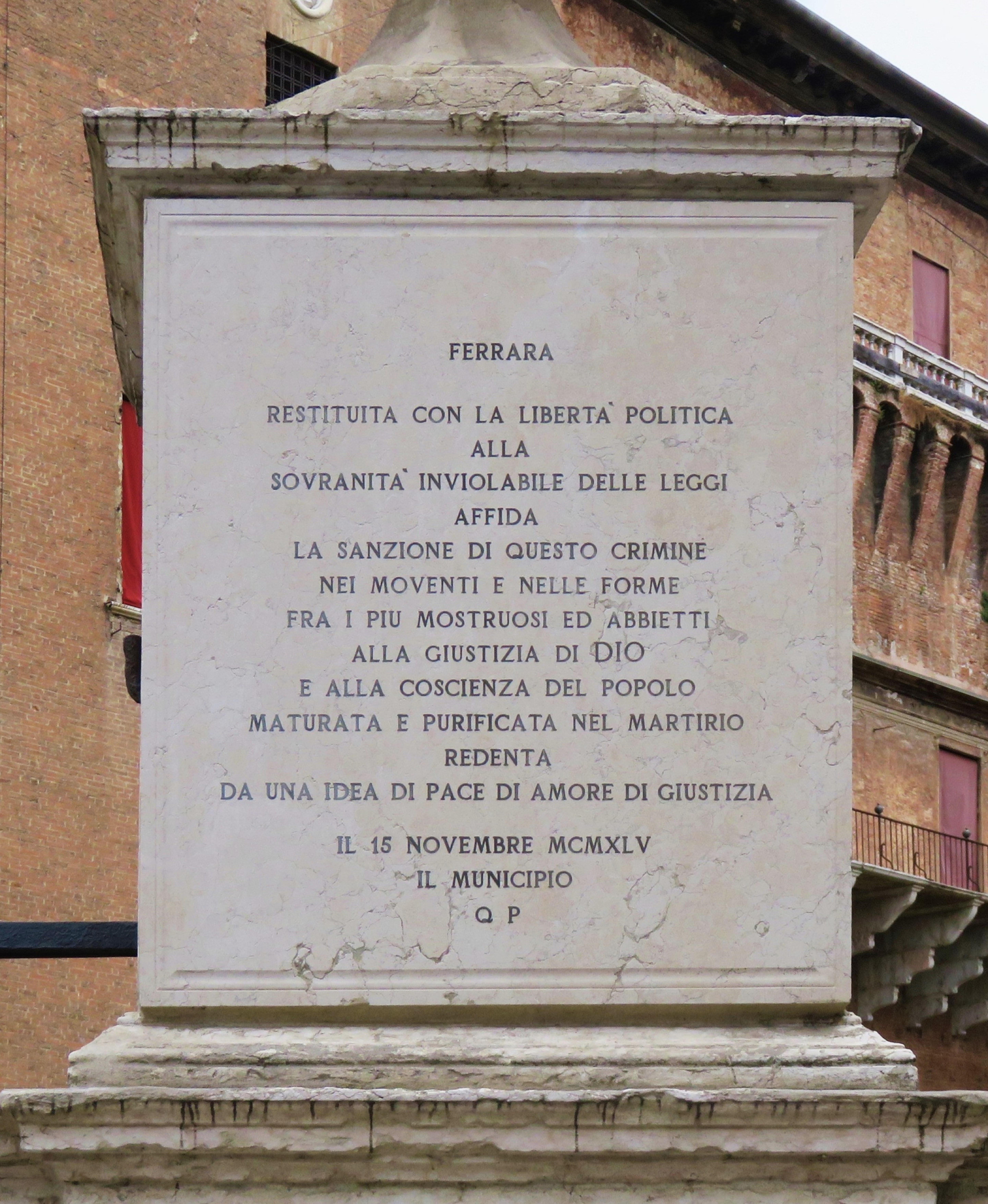 Seconda epigrafe sul pilastro di destra che regge il cancello di accesso alla fossa del Castello Estense. Testo: FERRARA RESTITUITA CON LA LIBERTA' POLITICA ALLA SOVRANITA' INVIOLABILE DELLE LEGGI AFFIDA LA SANZIONE DI QUESTO CRIMINE NEI MOVENTI E NELLE FORME FRA I PIU' MOSTRUOSI ED ABBIETTI ALLA GIUSTIZIA DI DIO E ALLA COSCIENZA DEL POPOLO MATURATA E PURIFICATA NEL MARTIRIO REDENTA DA UNA IDEA DI PACE DI AMORE DI GIUSTIZIA IL 15 NOVEMBRE MCMXLV IL MUNICIPIO Q.P.